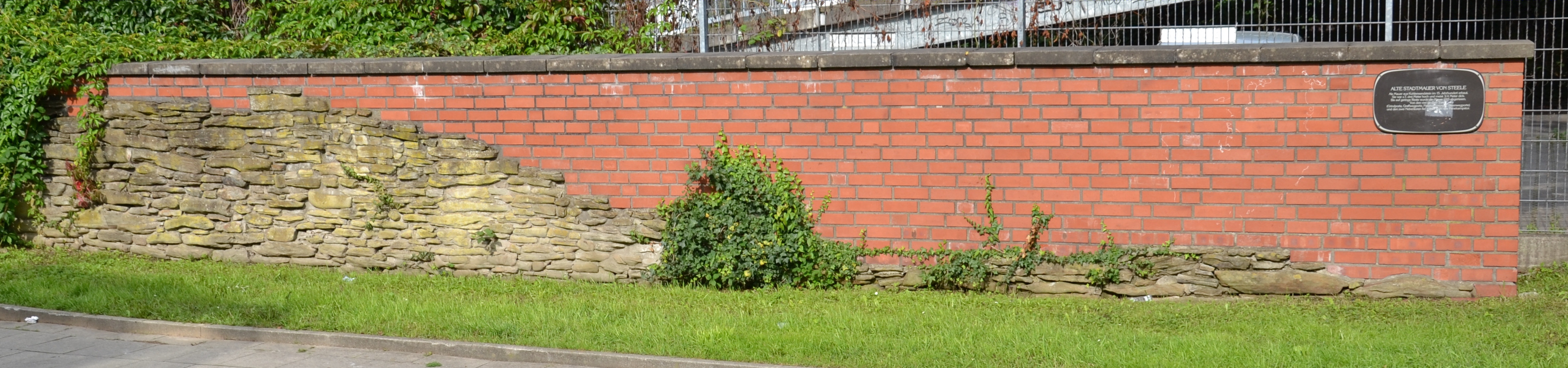 Teil der Stadtmauer in Steele, heute Stadtteil von Essen